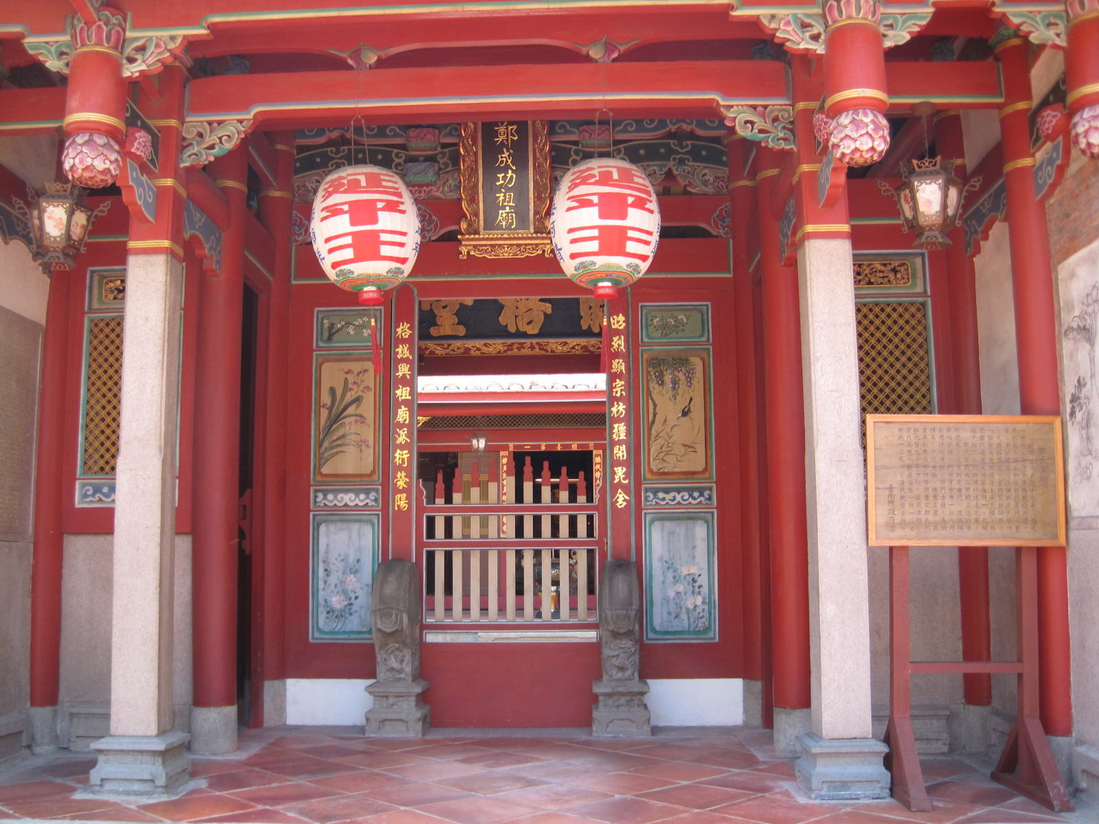 鄭氏家廟正門